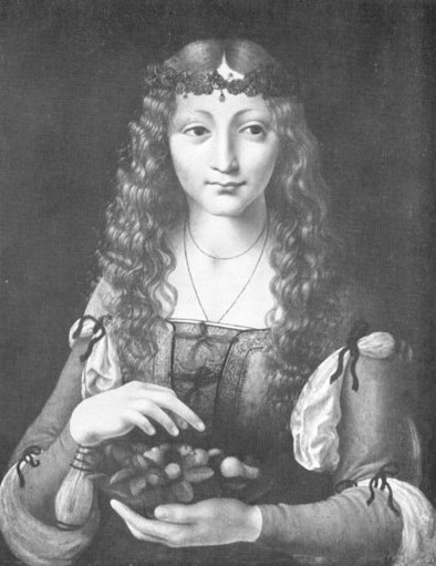 Bianca Maria Sforza